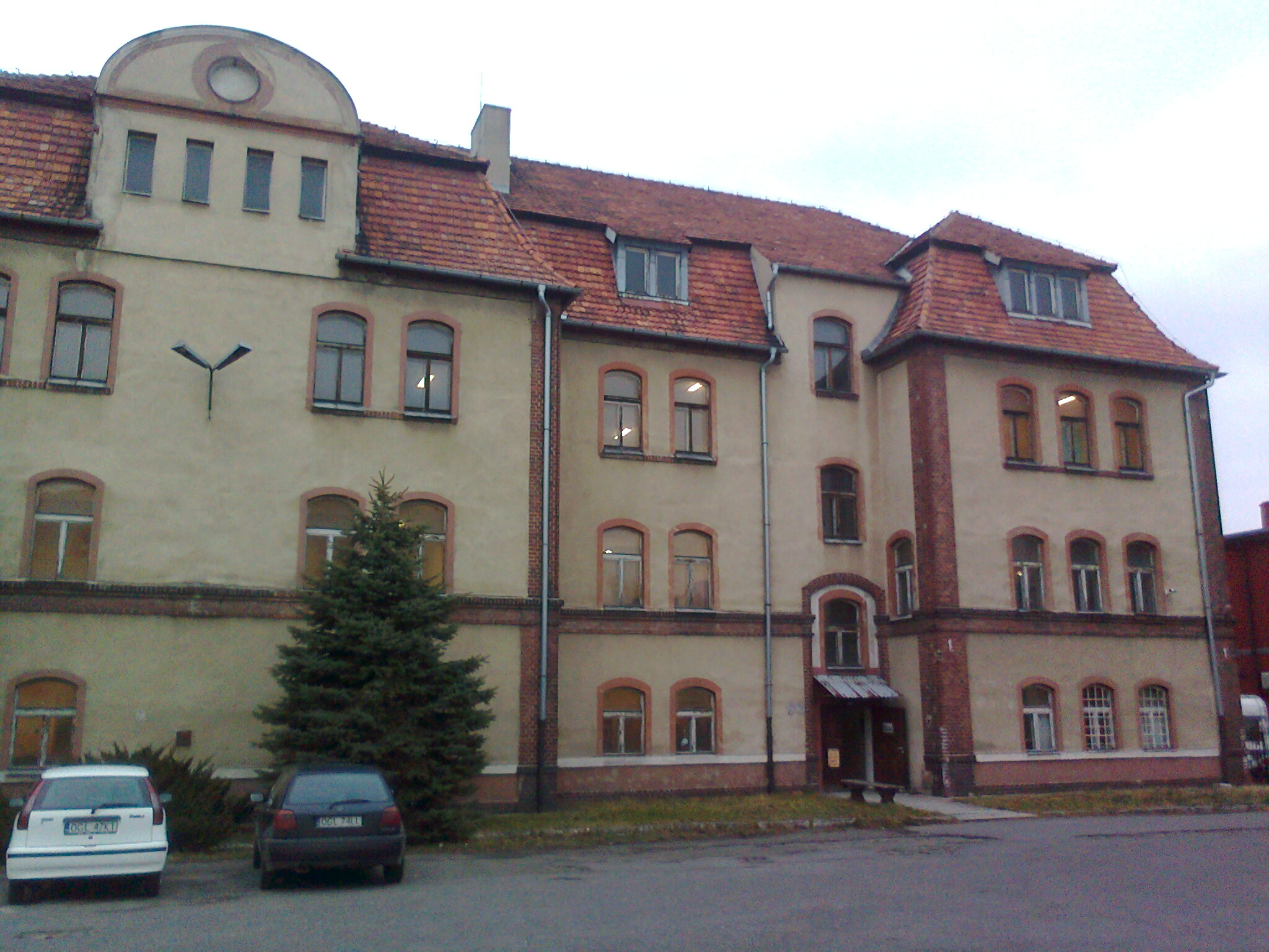 Głubczyce, byłe koszary w Głubczycach — widok od strony dawnego placu apelowego